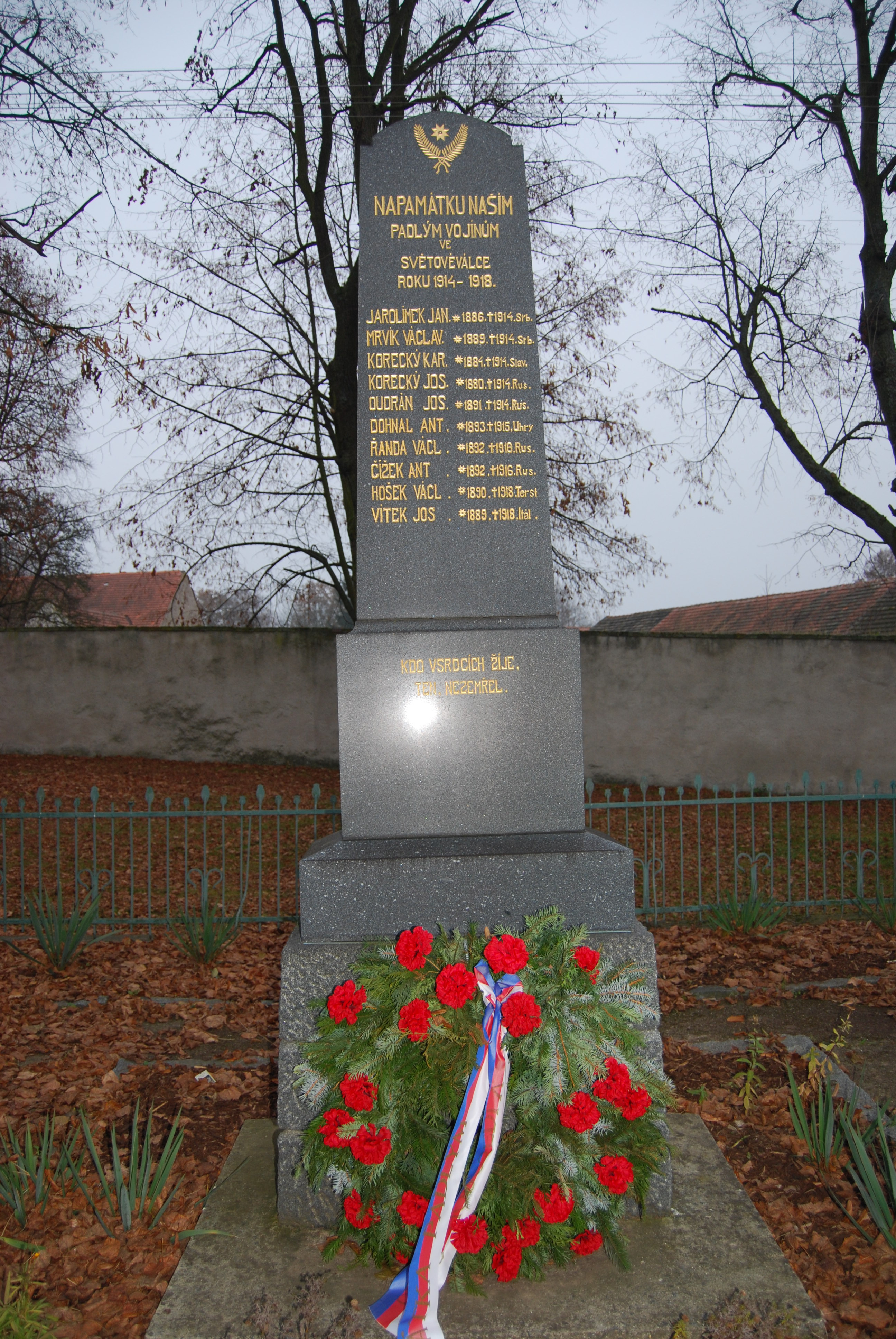 Pomník padlým v I. světové válce na návsi. Horosedly. Okres Písek. Česká republika.